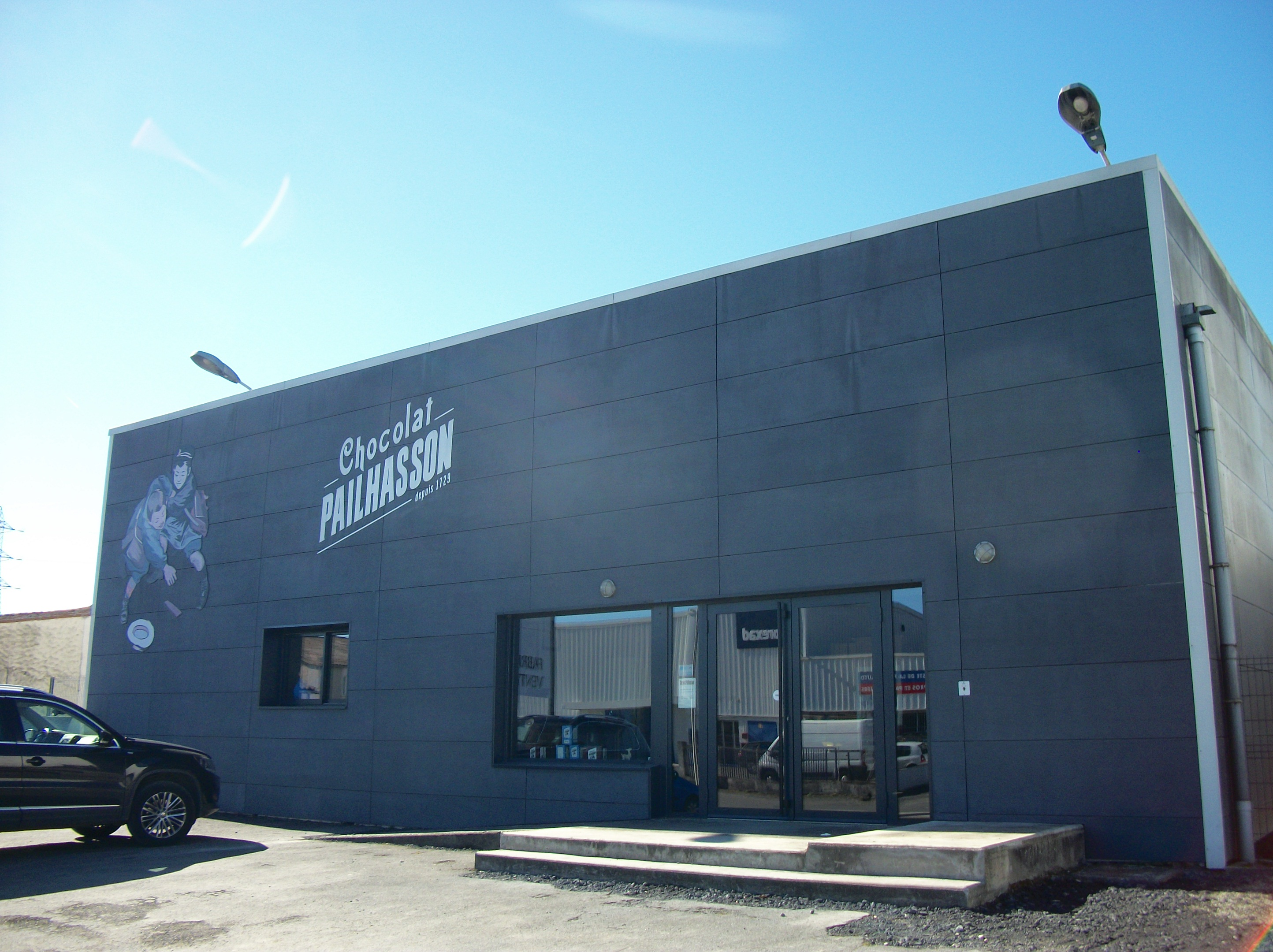 Ibos (Hautes-Pyrénées, France) - Boutique et atelier de fabrication de la Chocolaterie Pailhasson.